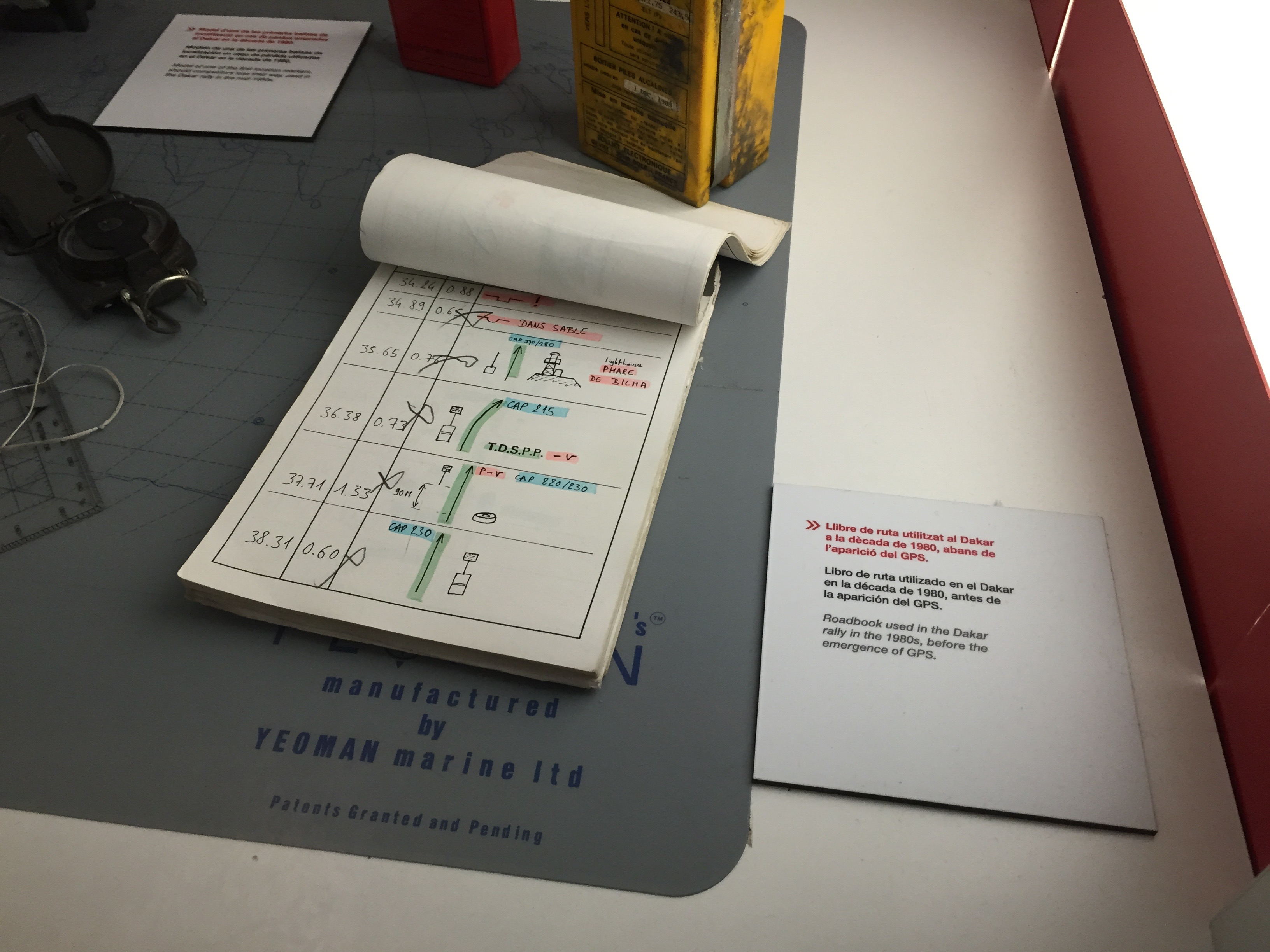 GPS manual